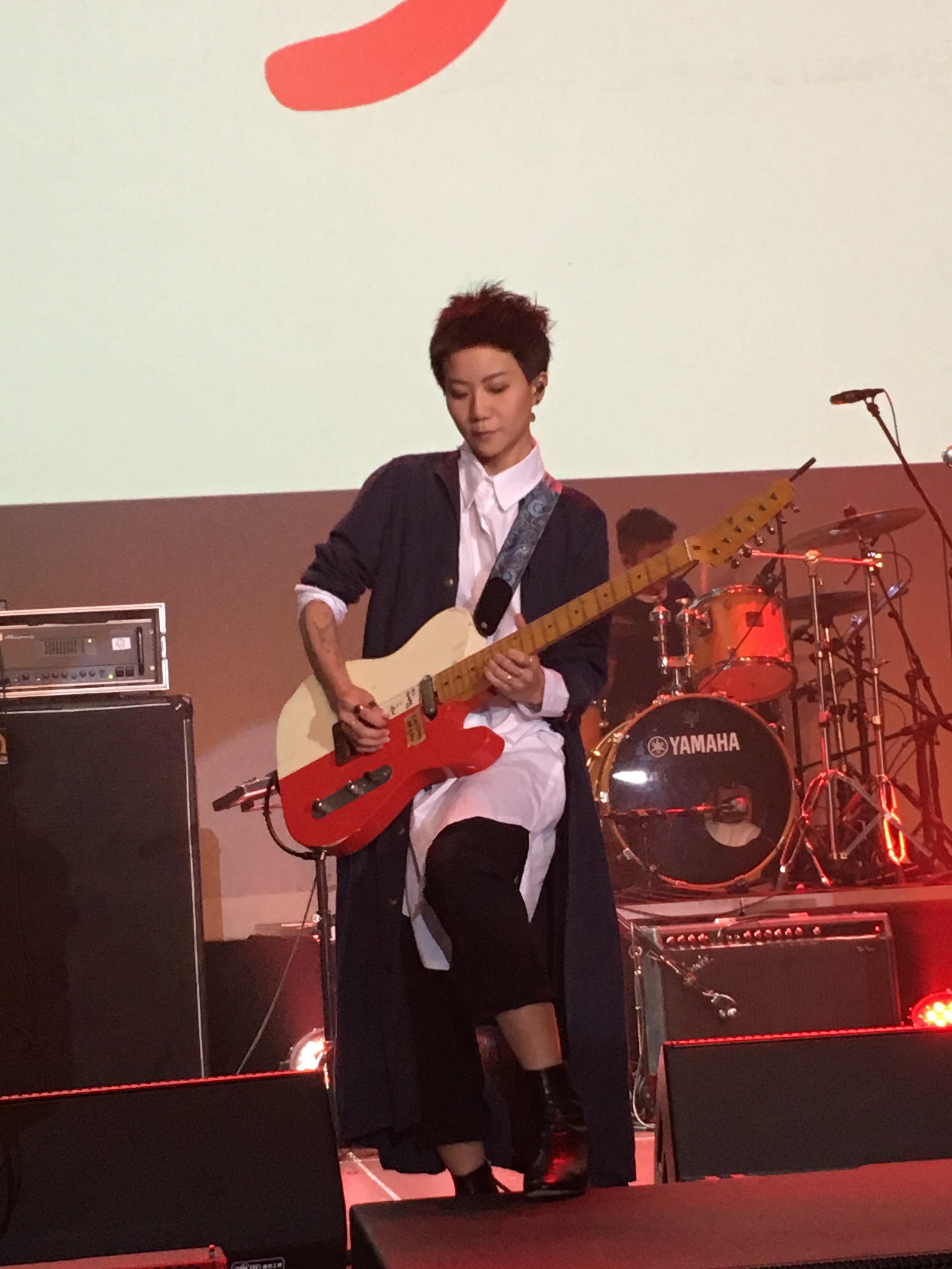 2017年盧凱彤